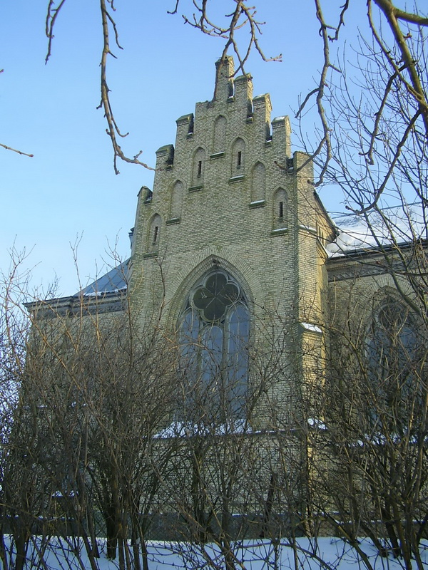 Міжэрычы. Касцёл Звеставання Найсвяцейшай Дзвевы Марыі